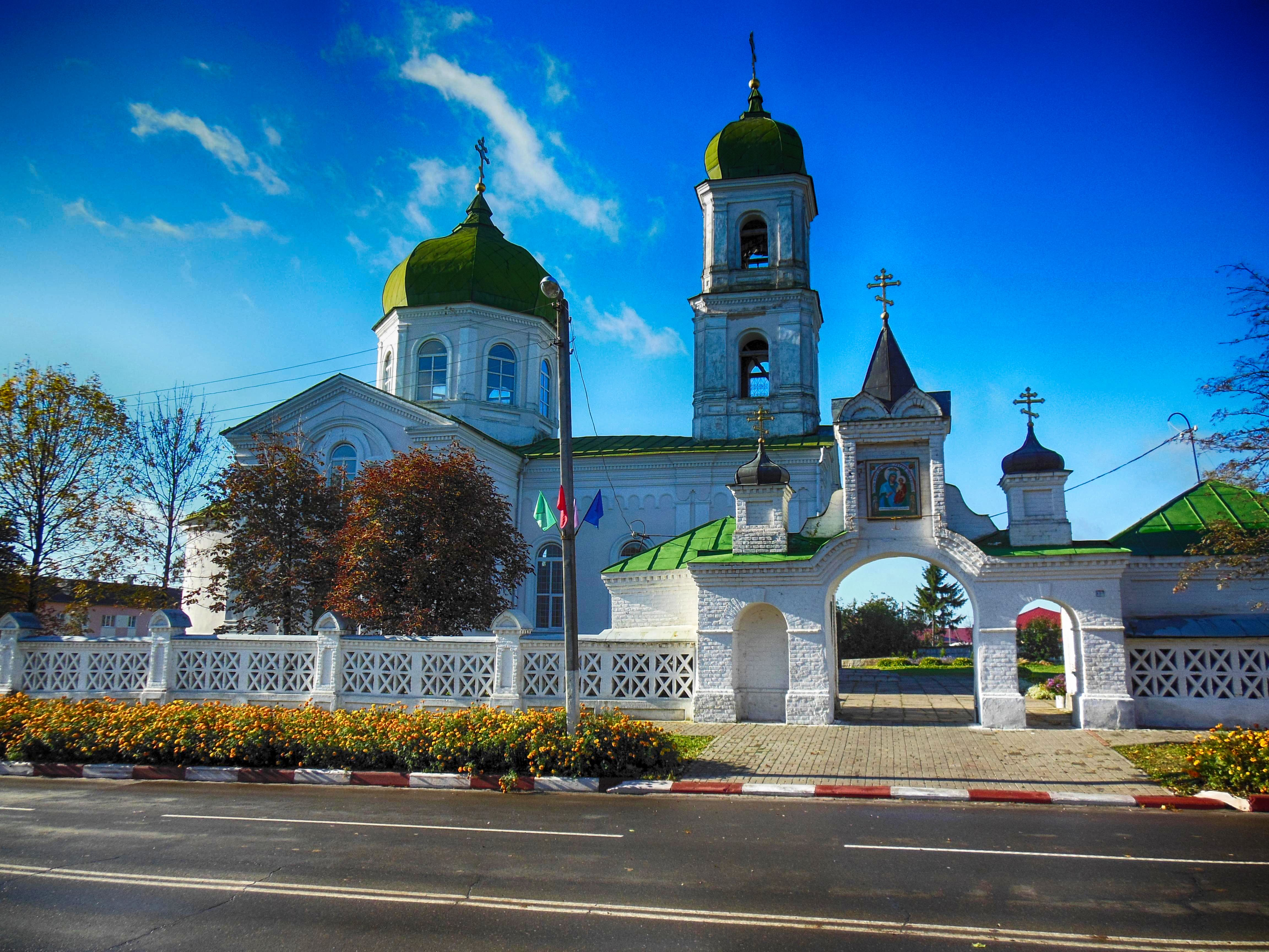 Беларуская (тарашкевіца): Мсьціслаў, царква сьв. Аляксандра Неўскага і брама